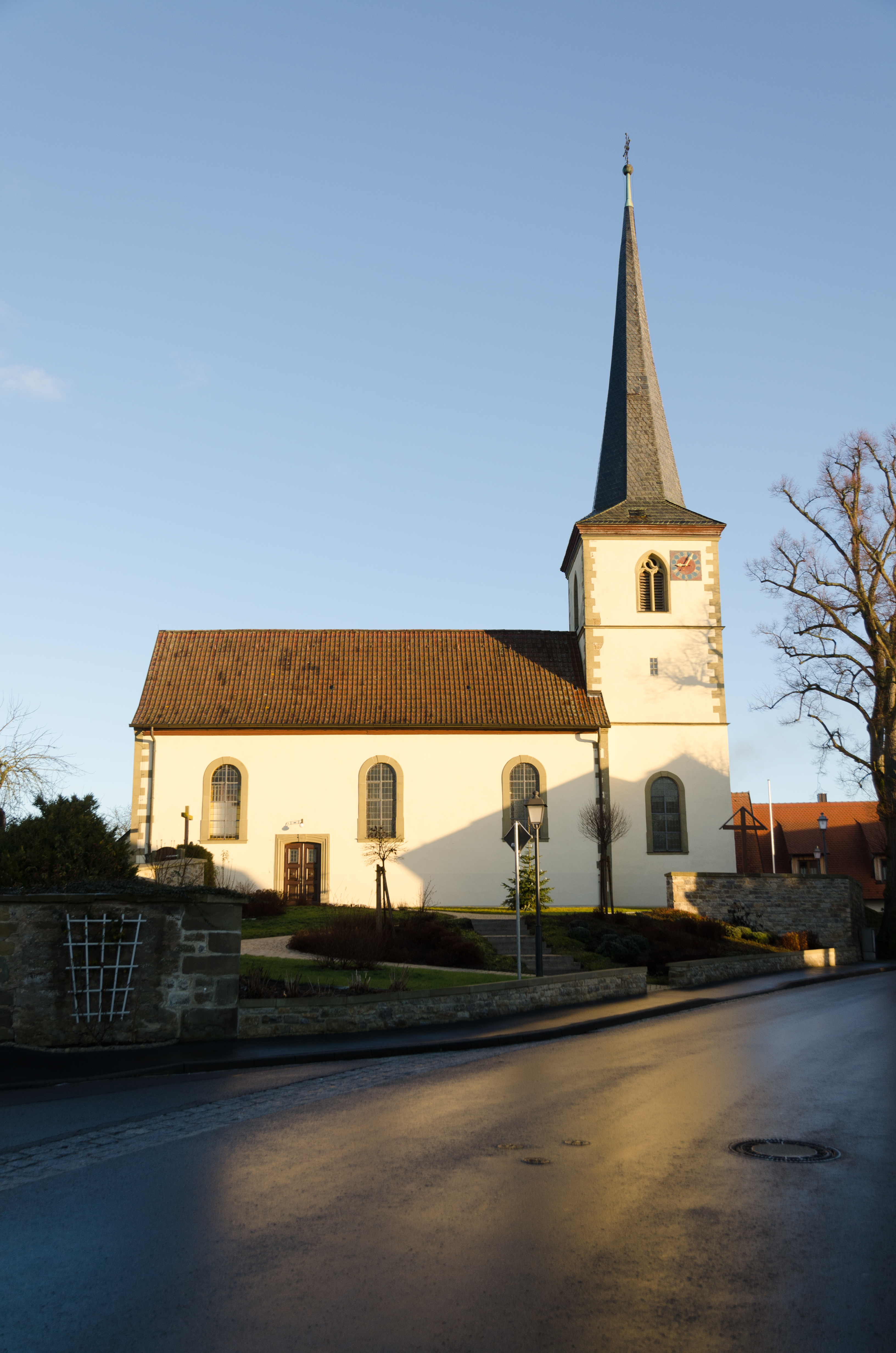 Wasserlosen, Burghausen, Dorfstraße 7, Katholische Pfarrkirche Mariae Geburt und St. Valentin